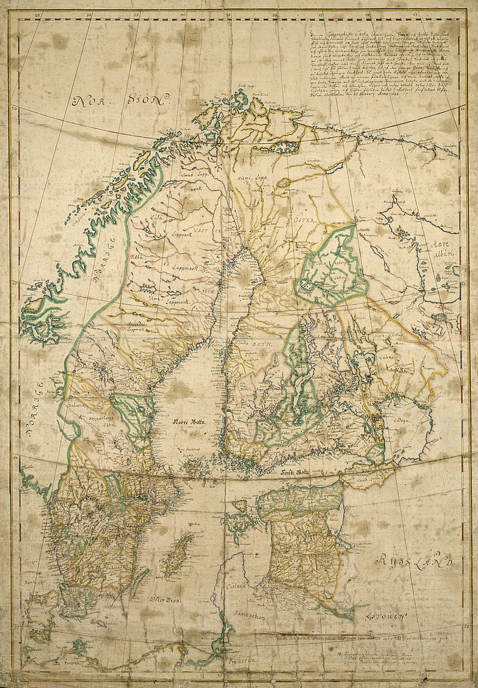 Carl Gripenhielms generalkarta från 1688, obeskuren